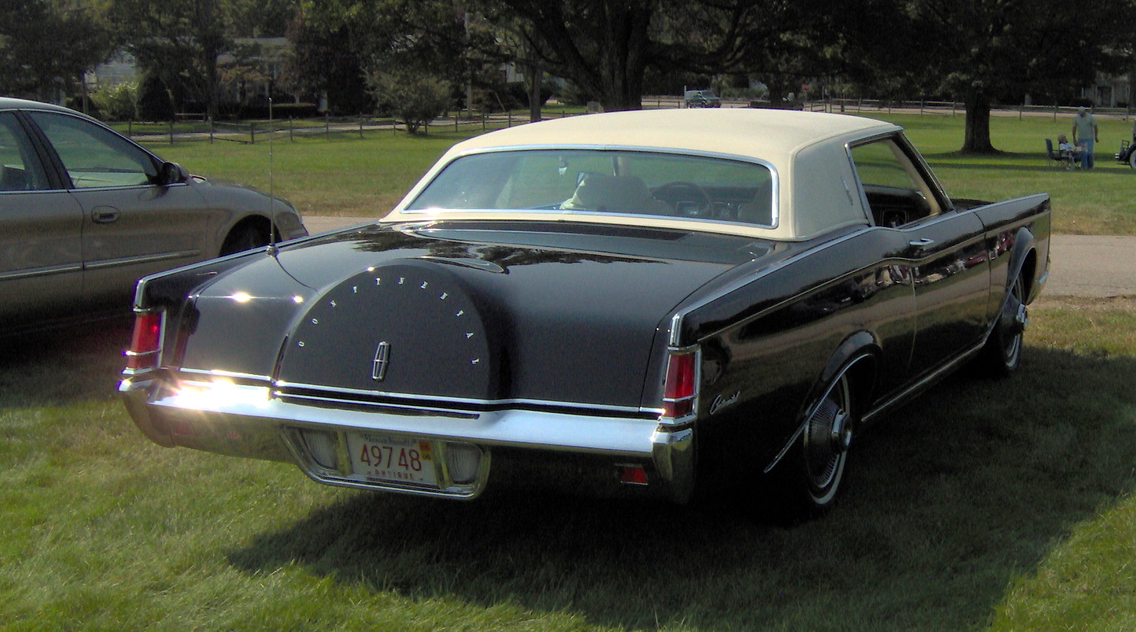 1969 Lincoln Continental Mark III